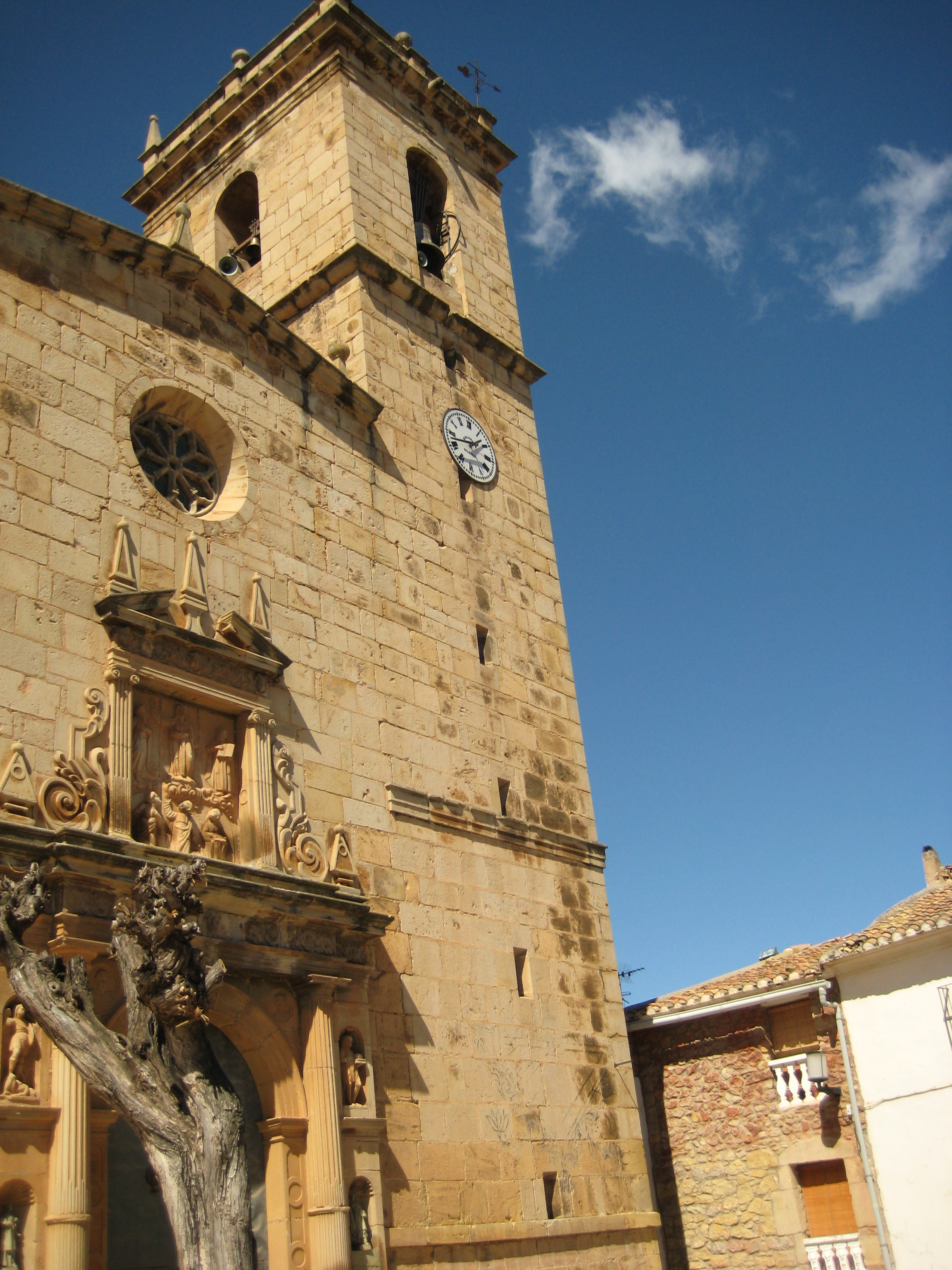 Torre campanar de l'església de la Transfiguració del Senyor de les Useres (L'Alcalatén)